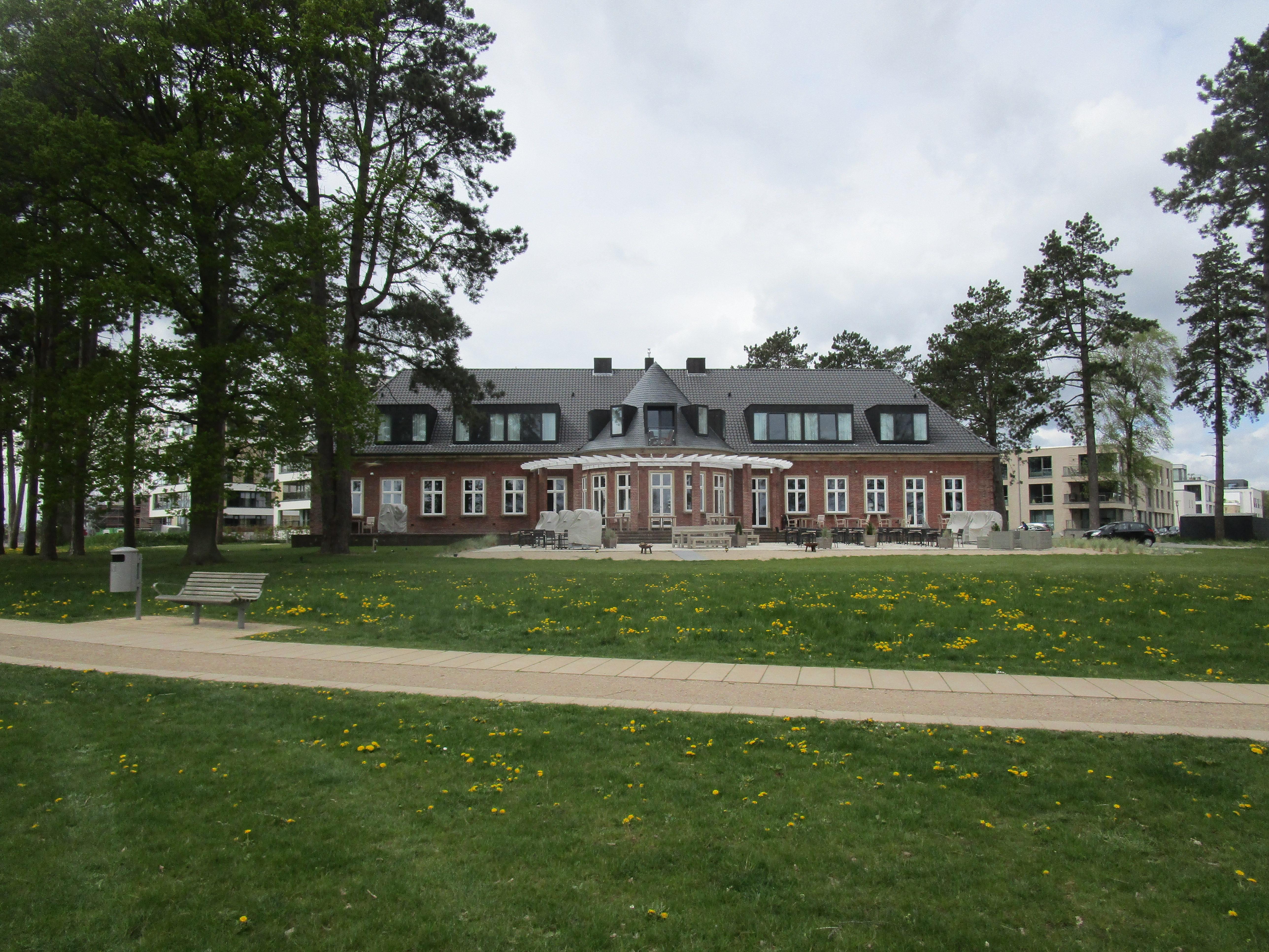 Casinobygningen i Slesvig-Friheden